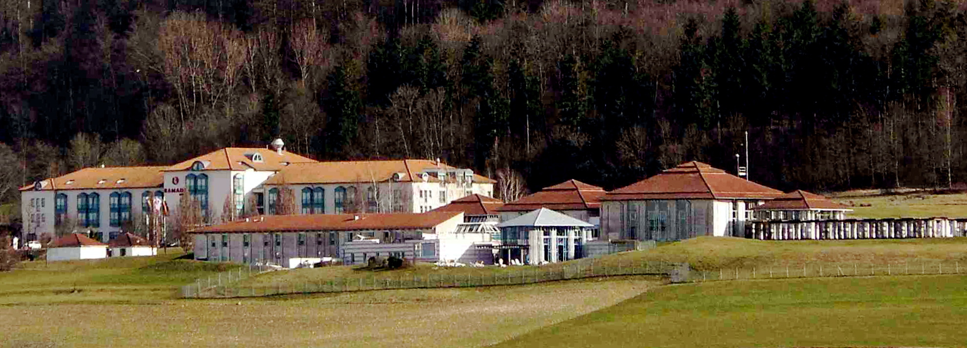 Die Limesthermen Aalen und das zum Komplex zugehörige Ramada-Hotel aus nordwestlicher Sicht